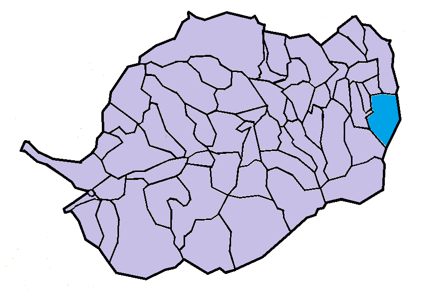 Glorianes en el Conflent, a partir del mapa municipal del Conflent de lliure disposició adaptat al Nomenclàtor toponímic aprovat el 2007